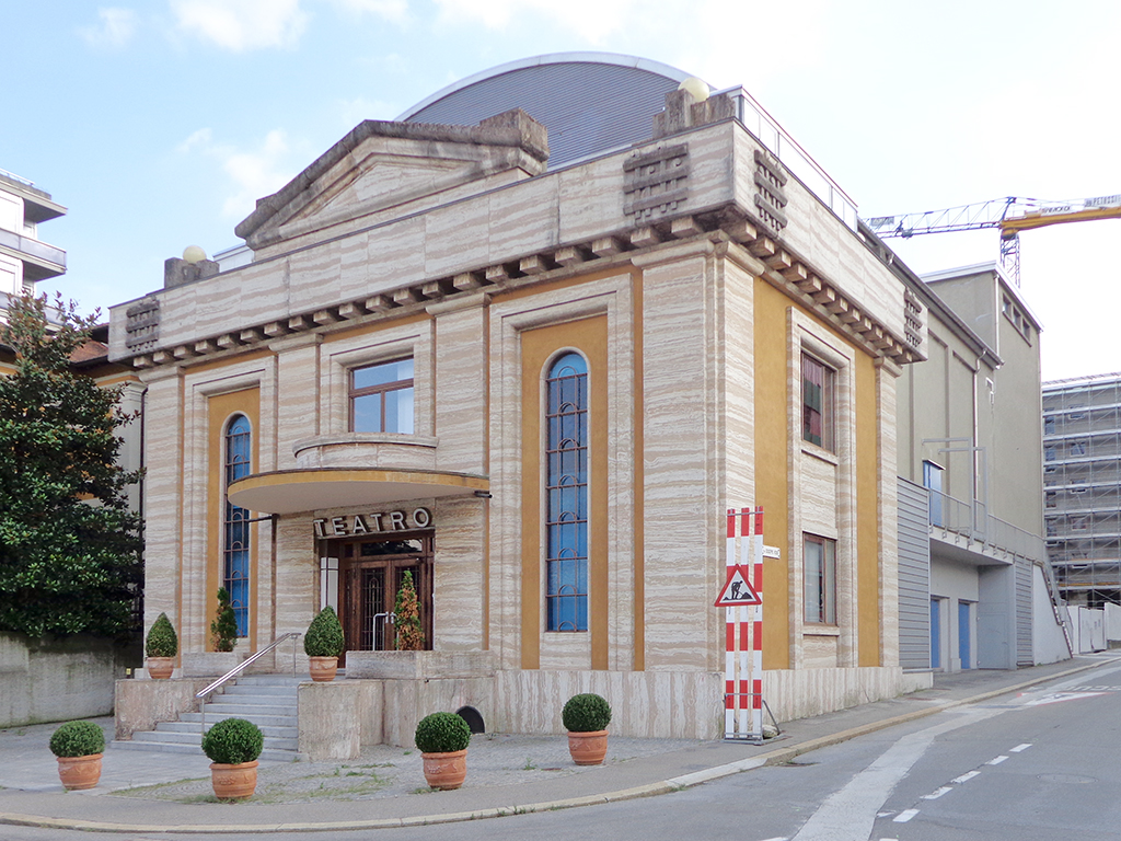 Chiasso, il teatro. Fu costruito dal 1935 al 1936 su progetto di Americo Marazzi (come riportato da un pannello informativo).